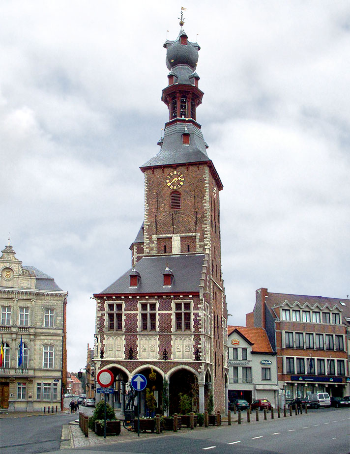 Halletoren (Hall Tower) (Tielt, Belgium) November 2004